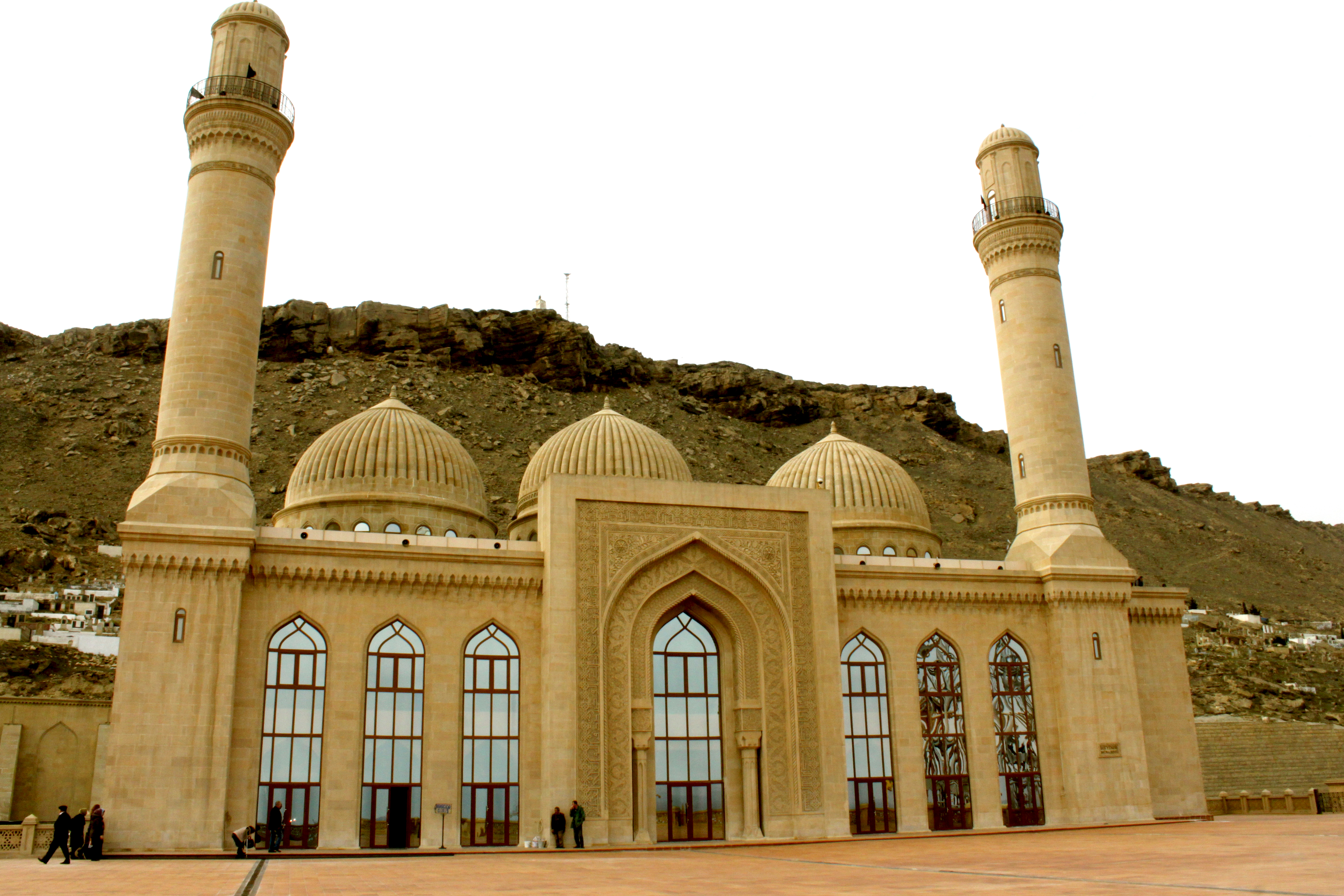 Bibiheybət məscidi